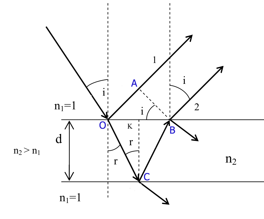 Интерференция в тонких плёнках